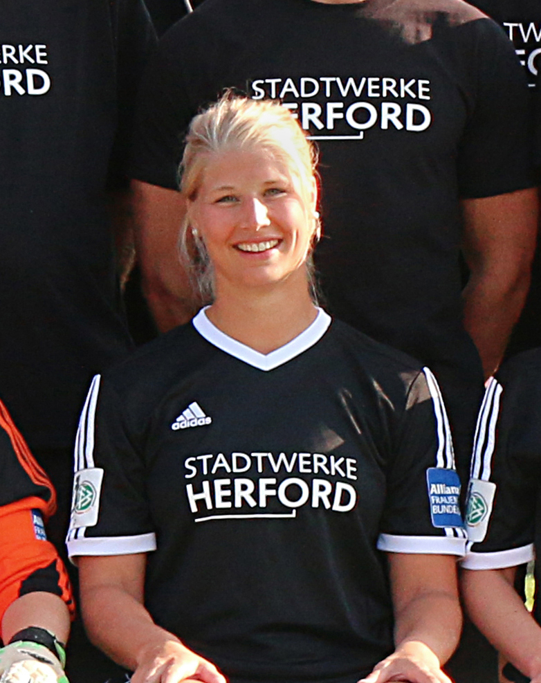 Herforder SV Borussia Friedenstal Team 2014/2015